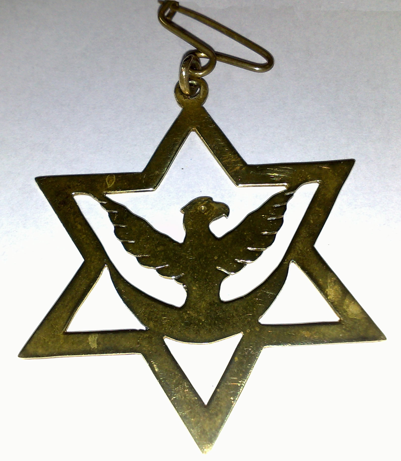 Estrela com águia sobre crescente. Símbolo do Santo Daime usado pelos seus adeptos "Fardados".